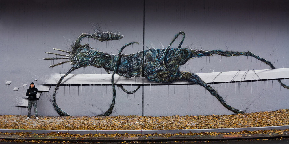 Mural - Koerperwesen @ Bochum